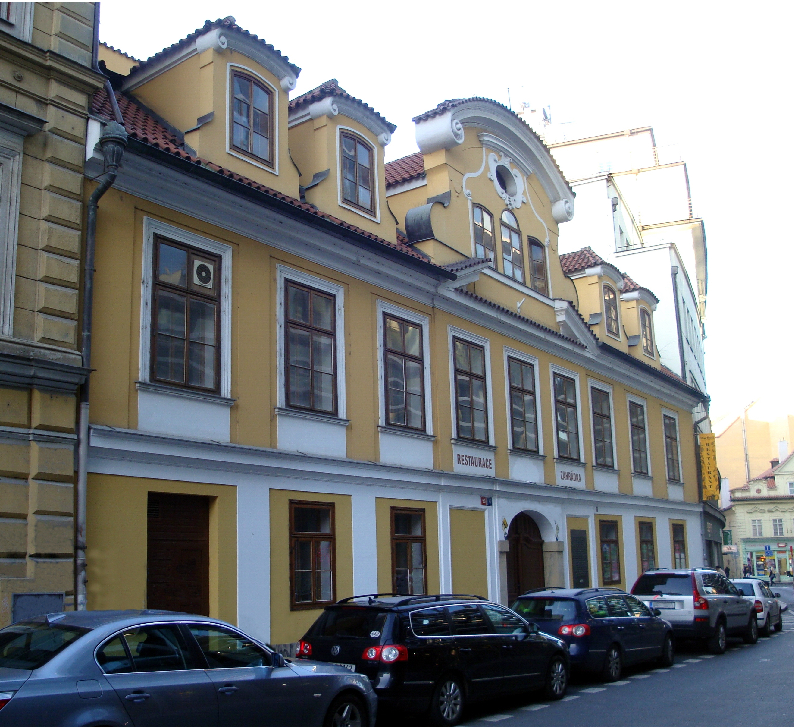 Zedwitzovský palác, sídlo Aventina 1927-1933. Prague 1, Purkyňova 53/4.